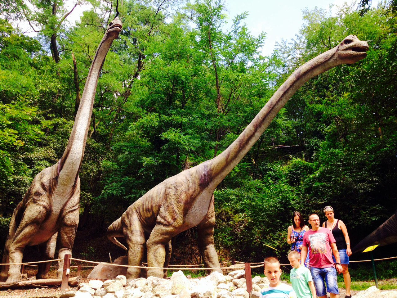 Brachiosaurus